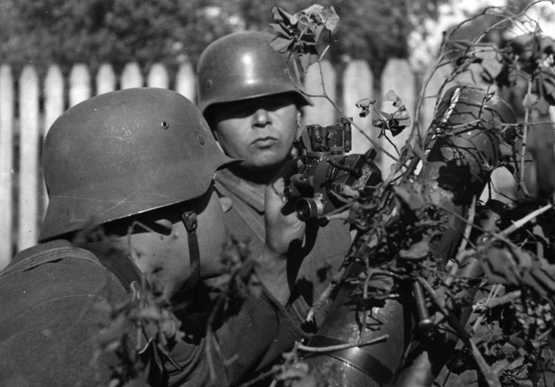 Wolga-Tartaren am schweren Granatwerfer Foto H. Philipps Wehrbilderdienst Nr 463/6